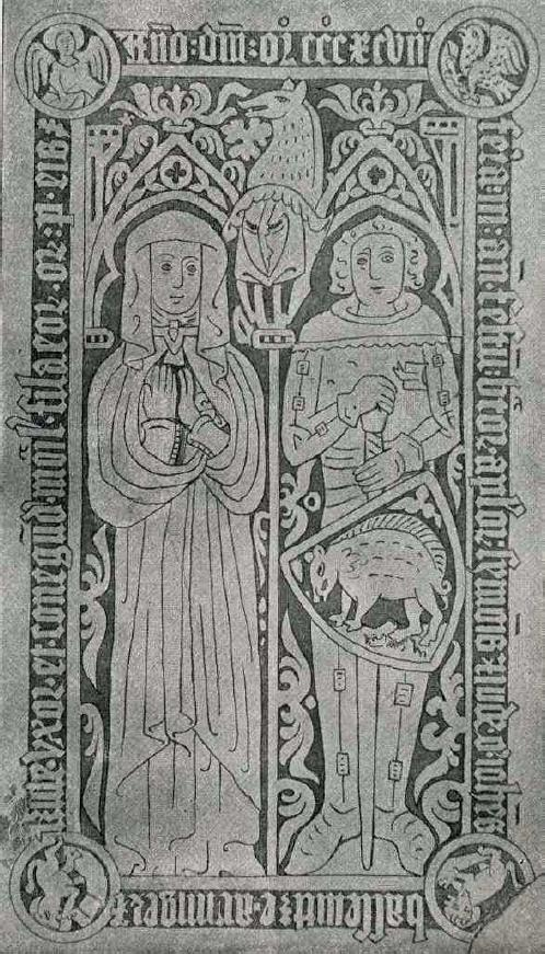 Der 2,1 x 1,2 m Grabstein im Chor des Klosters zum Heiligen Kreuz in Rostock stellt unter zwei Spitzbögen rechts eine betende Frau und links einen Ritter dar, die Hände auf dem Schwert gestützt, der Schild an die Lende gelehnt. Der Helm steht im Winkel der zusammenlaufenden Spitzbögen. Auf den Ecken der Evangelistensymbole besagt eine Umschrift: „Anno Domini MCCCXCVII feria tertia ante festam beatorum arostulorum Symonis et Judae. Johannes Bassewitz, armiger. Anne […] uxor et Conegundis monacha filia eorum. Orate pro eis!“ (1397 am dritten Tag vor dem Fest der Apostel Simon und Judas. Ritter Johannes Bassewitz mit Ehefrau Anna [v. Züle] und ihrer Tochter, der Nonne Kunigunde. Betet für sie!)